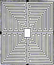 typisches römisches Labyrinth